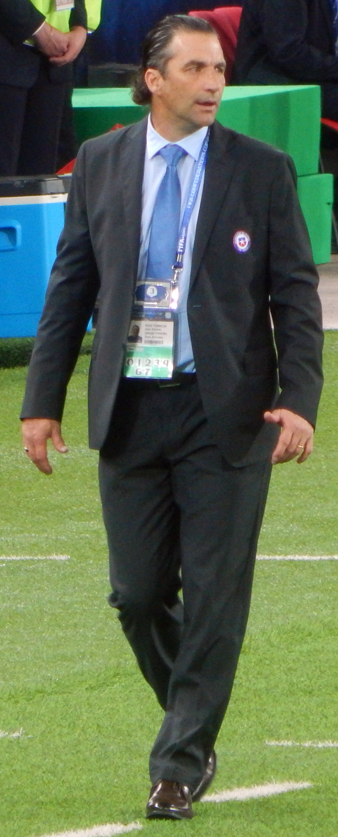 Хуан Антонио Пицци